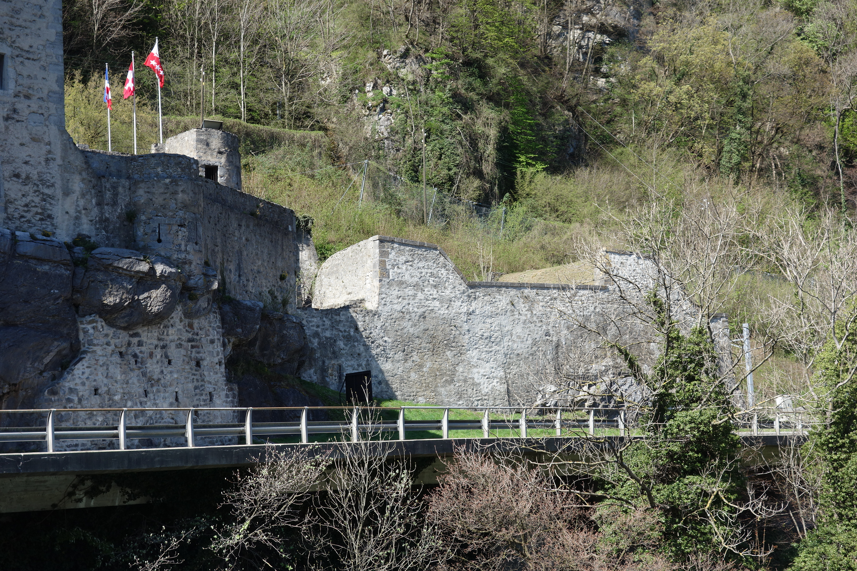 Dufourbefestigungen Saint-Maurice VS, Schweiz